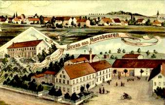 Ansichtskarte von Moosbeuren, Deutschland um 1900.